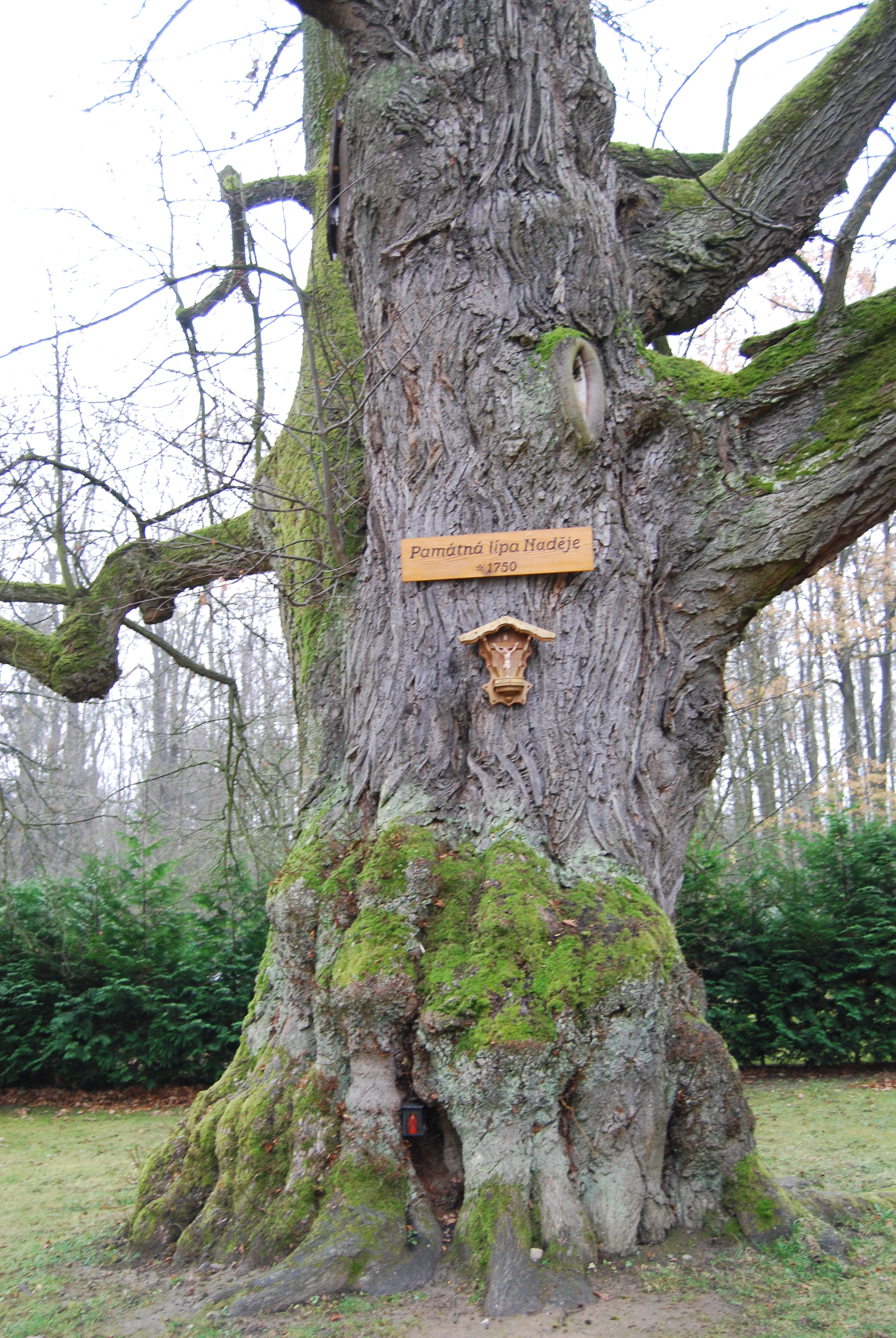 Lípa Naděje - starý památný strom v poutním komplexu Lomec. Lomec je u Netolic, v katastru vesnice Nestanice v okrese Strakonice. Česká republika.